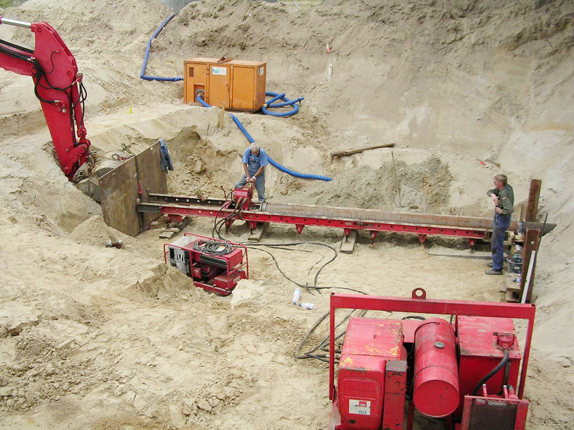 Vorrichtung zum Bohrpressen_02.JPG